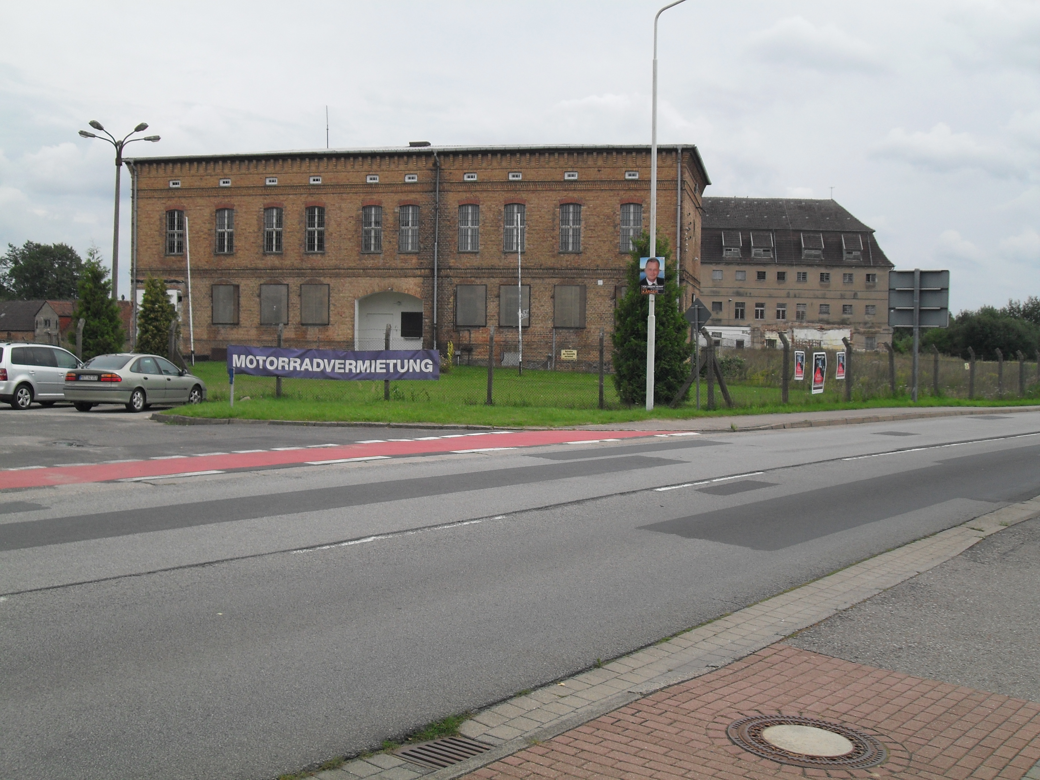 Gesamtansicht Altstrelitzer Gefängnis